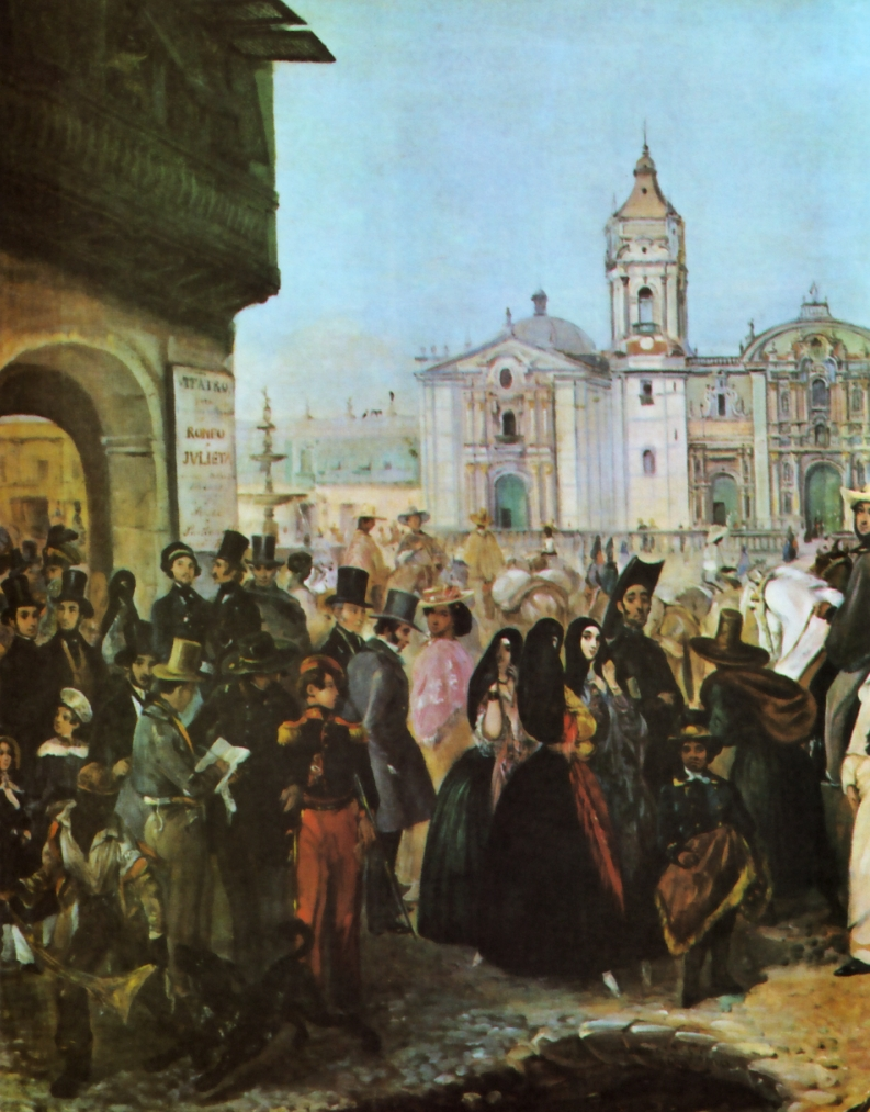 Plaza mayor de Lima. Hacia 1840.